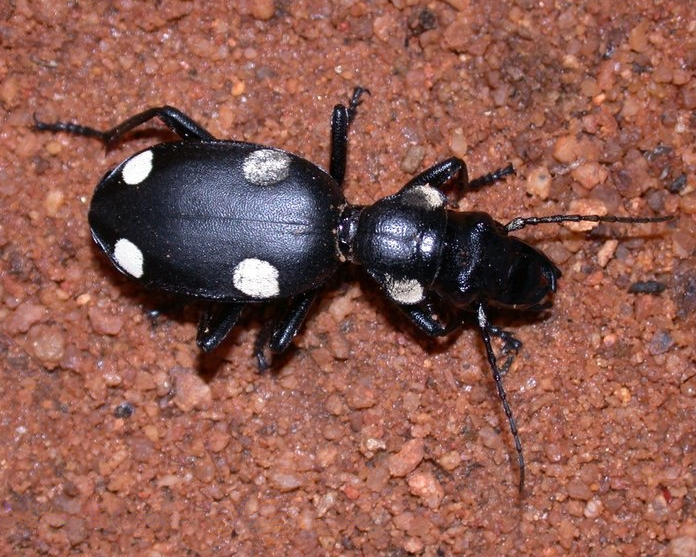 Anthia sexguttata Coleoptera Carabidae